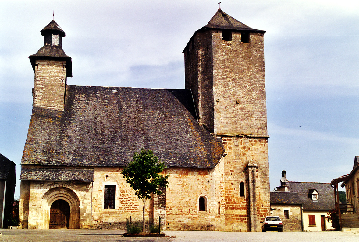 Eglise Saint Martin de Gignac Lot